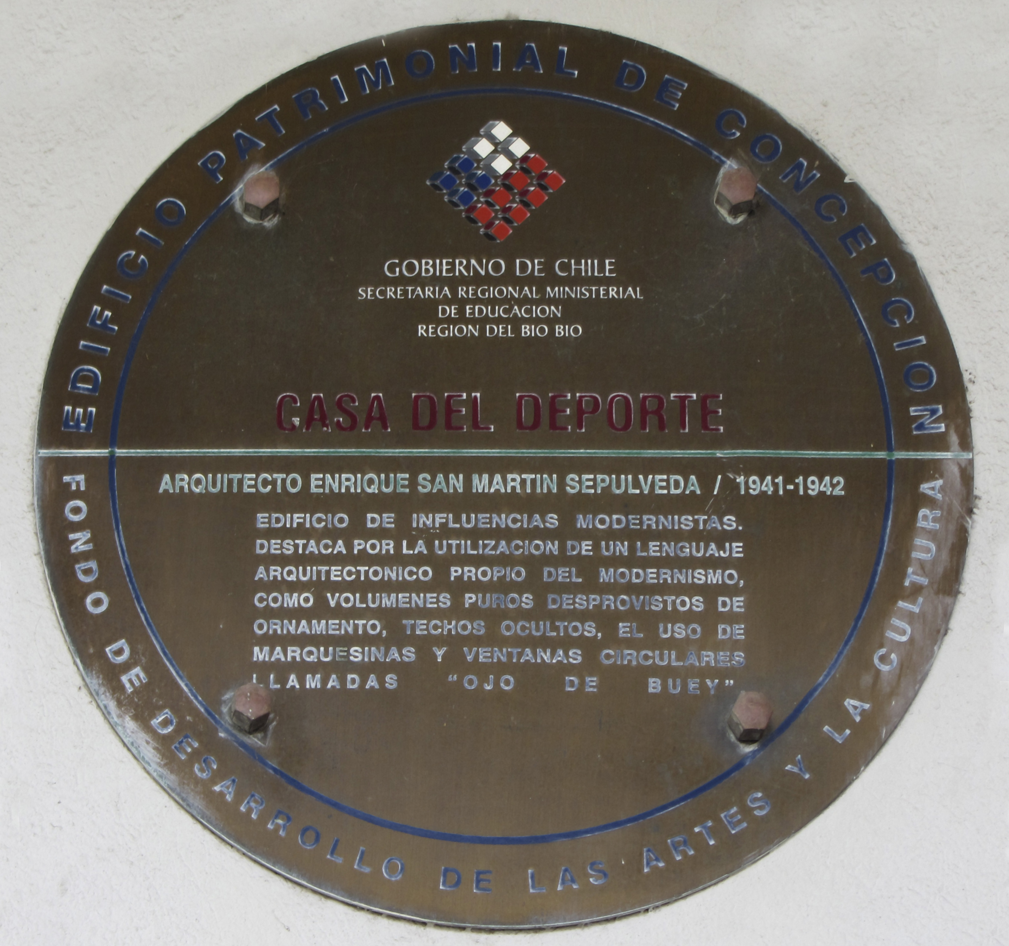 Placa de la Casa del Deporte Universidad de Concepción, Chile, 2012